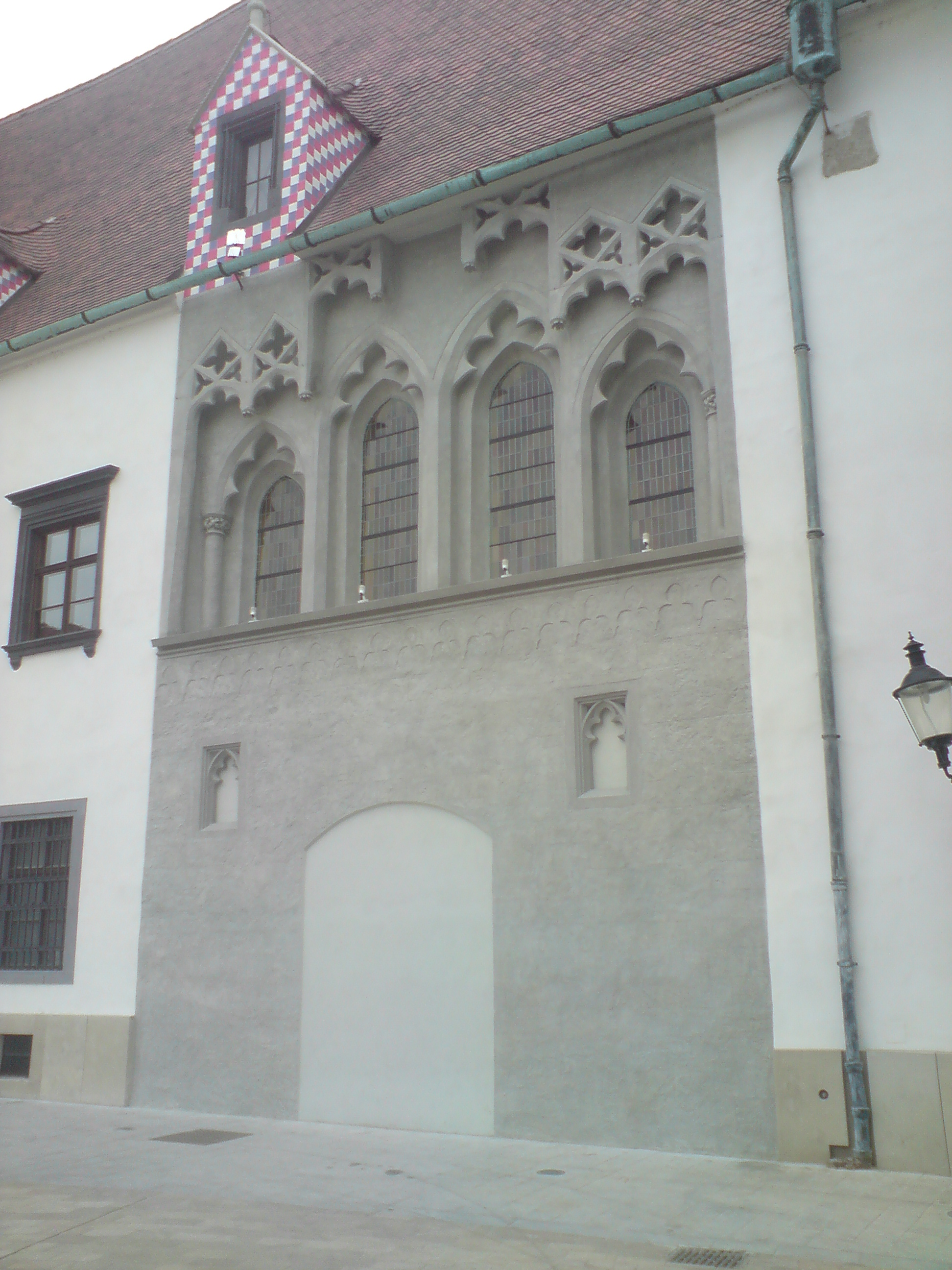 Stará radnica, Bratislava